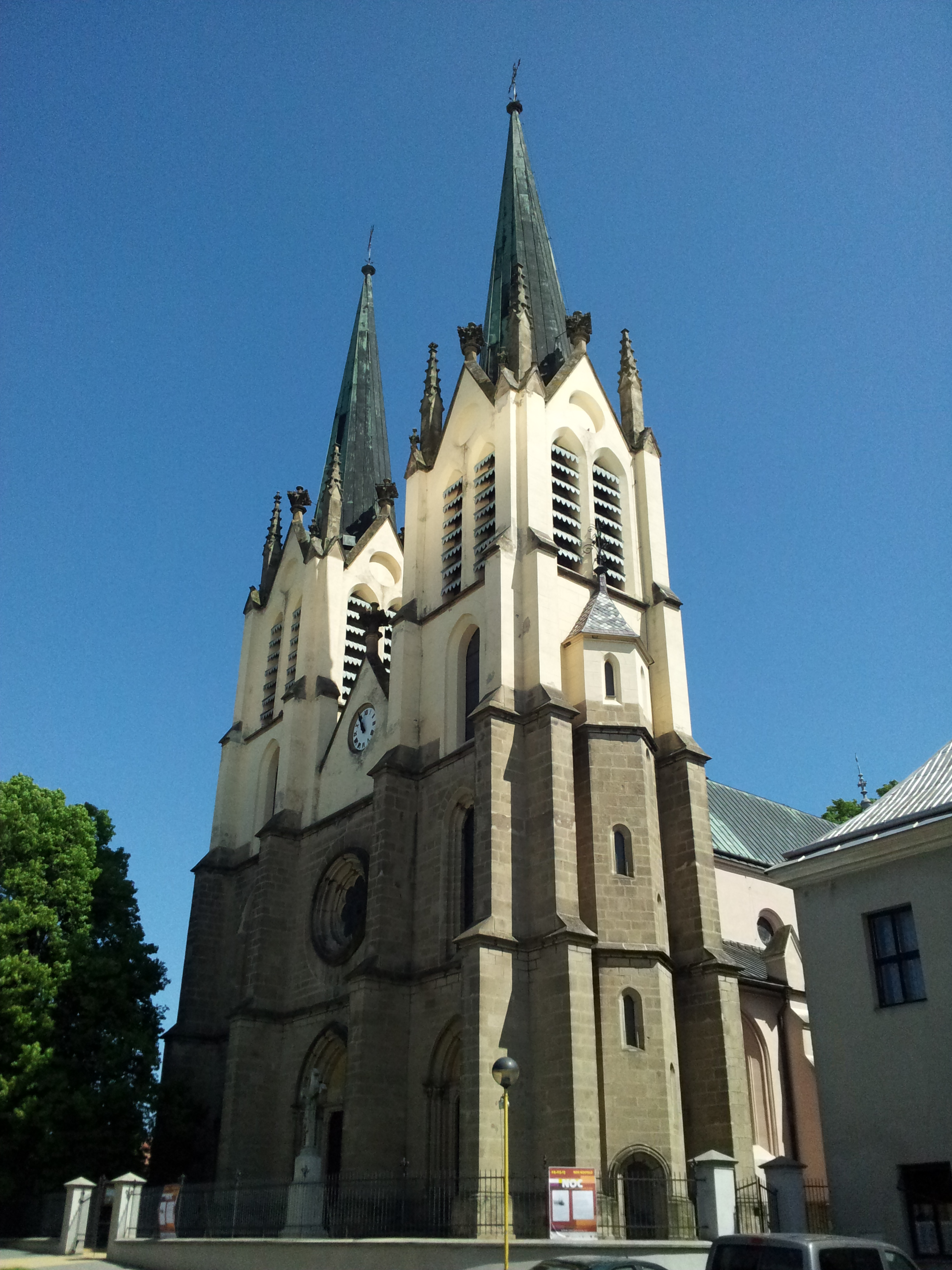 Kostel sv. Petra a Pavla (Rataje), Rataje